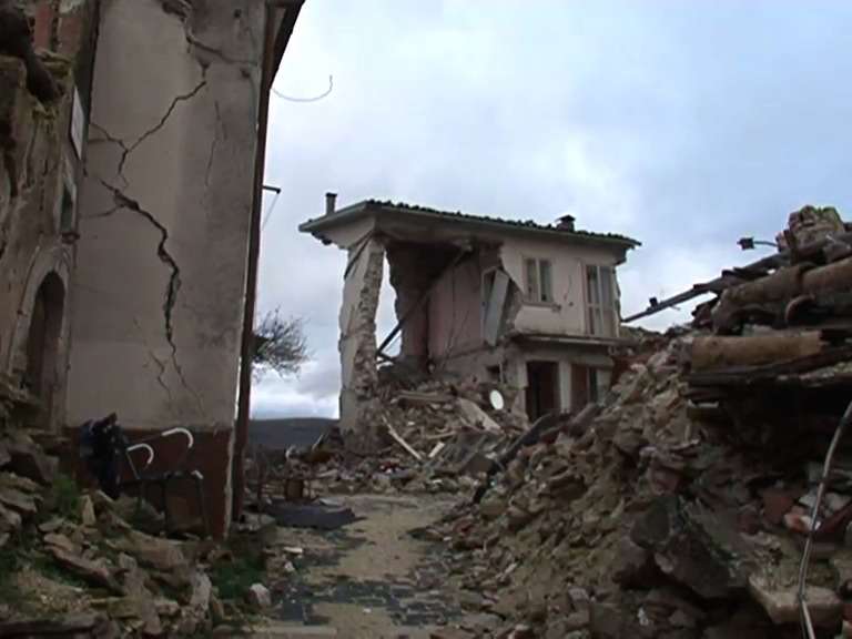 Terremoto 2009 - Italy - L'Aquila - Poggio di Roio - Nove mesi dopo